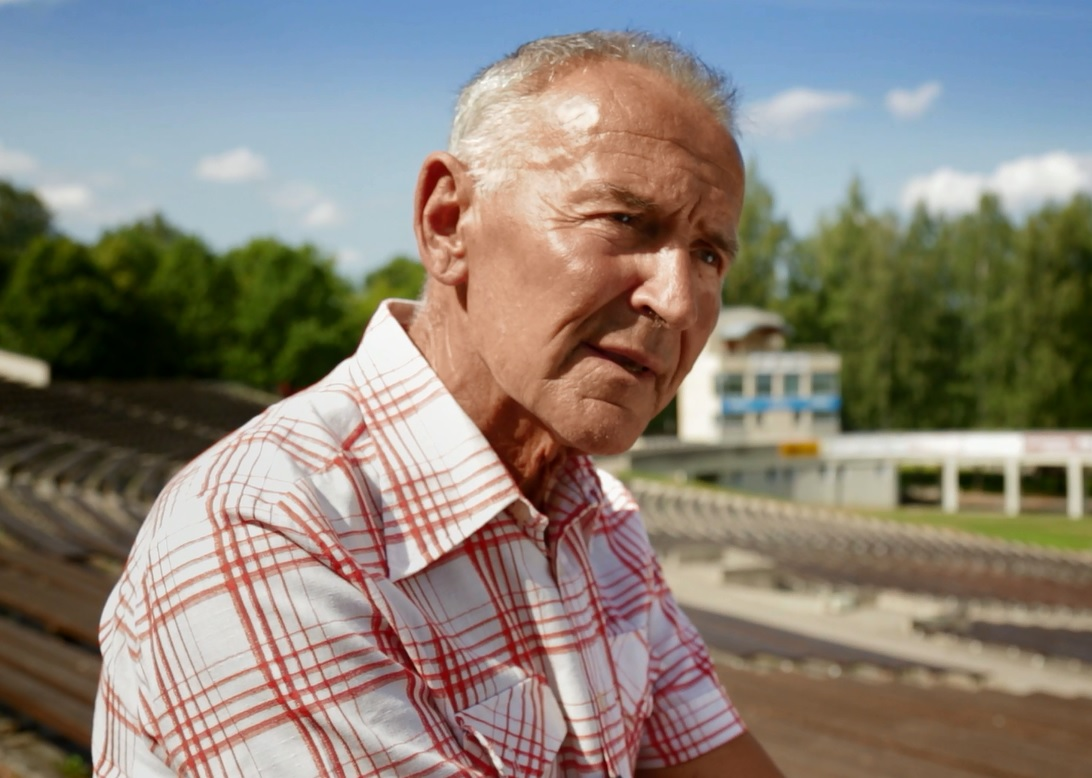 Henn Tiivel andmas intervjuud TÜRKA juubelifilmile.